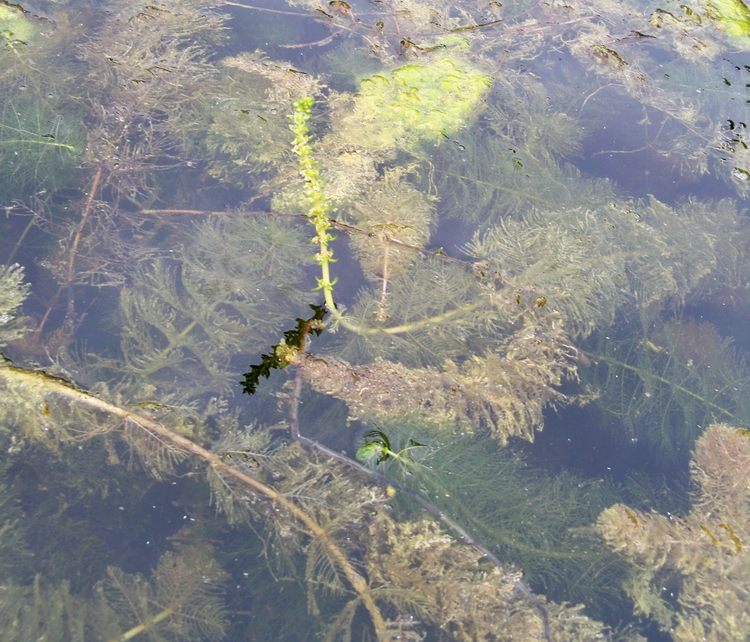 Zbiorowisko wywłócznika okółkowego w stawie w Dolinie Zwolenki